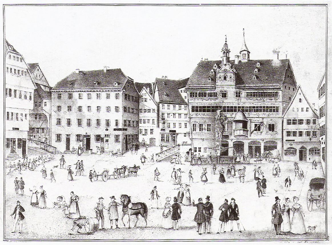 "Marktplatz 1825" (Gouache 23,5 x 29,3 cm, Träger 29,5 x 36 cm); Schefold 9493. [Erschienien in „Tübinger Blätter“ 1899, S. 23]